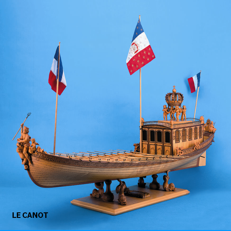 LE CANOT